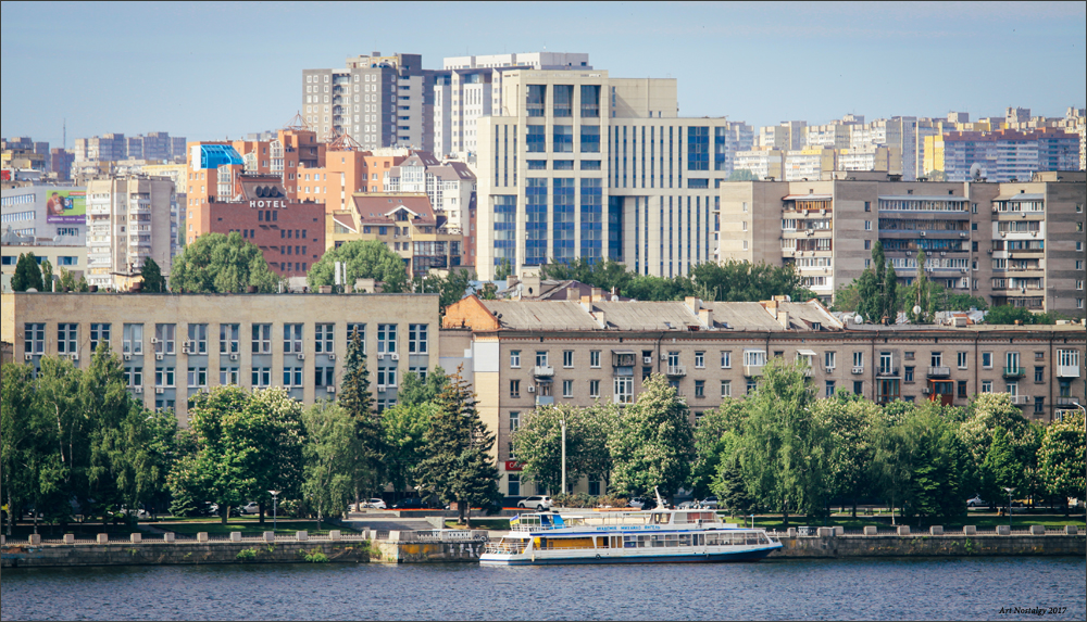 вид на частину набережної на правому березі